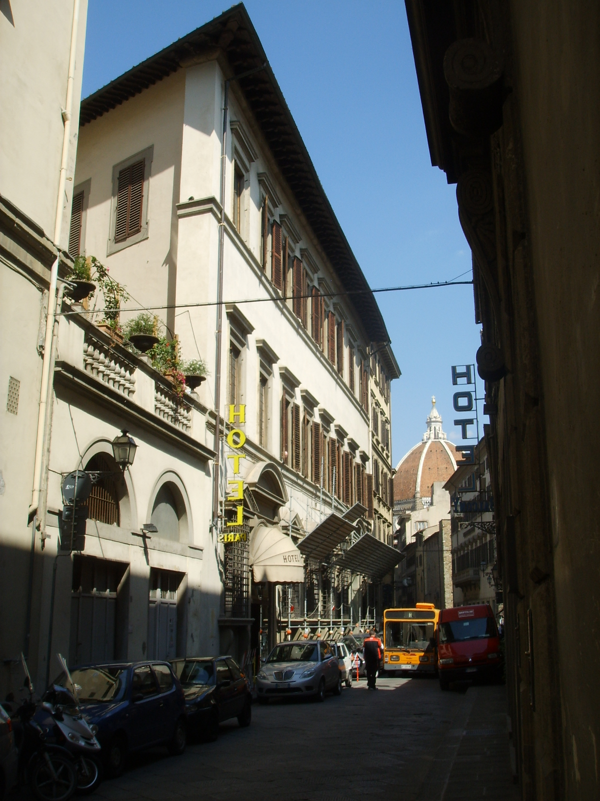 Palazzo venturi